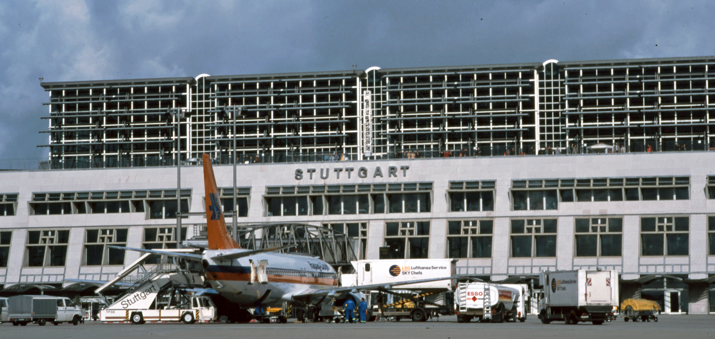 Flughafen